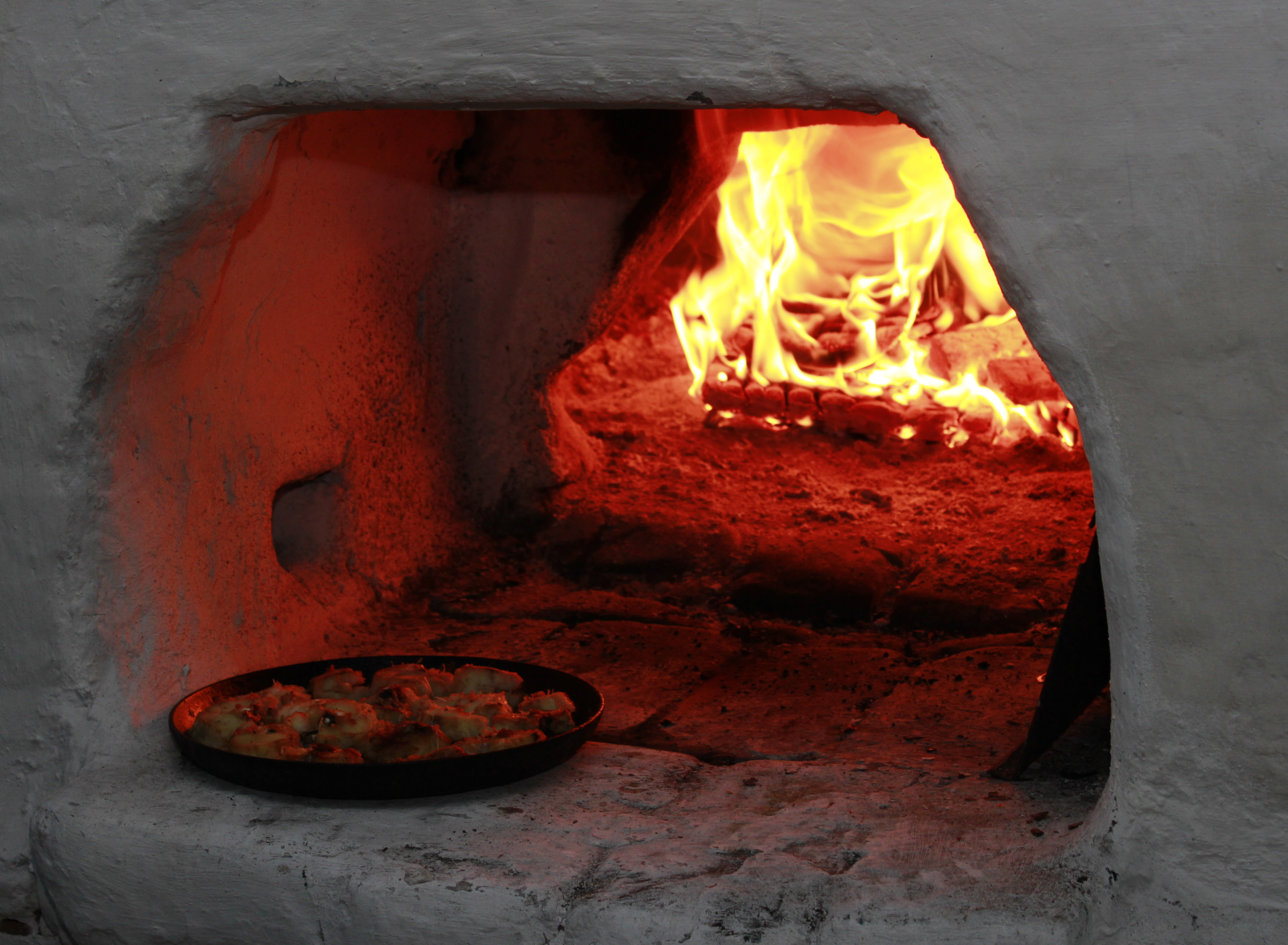 Русская печь в доме семейских в Новой Бряни. Заиграевский район, Бурятия